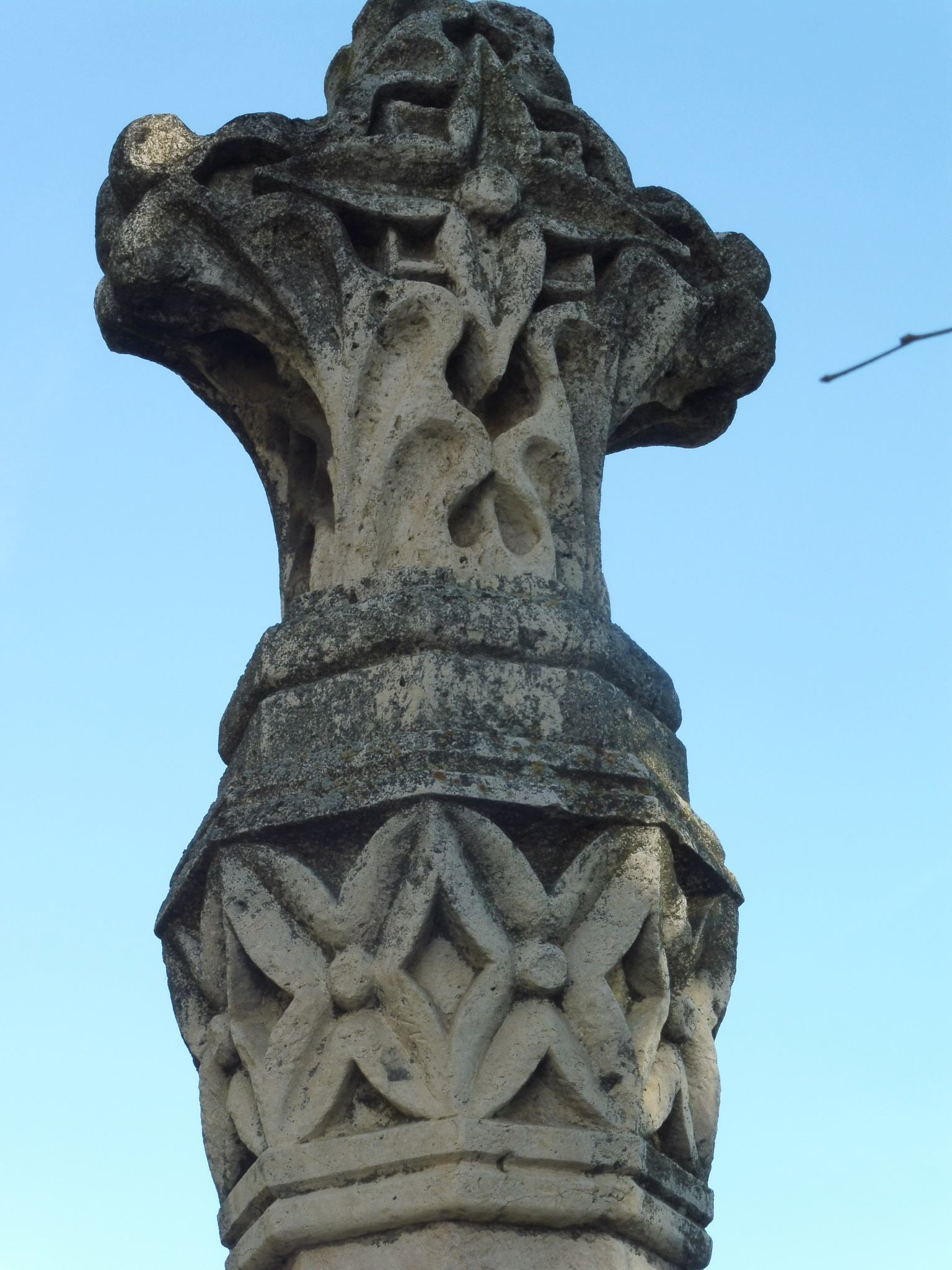 Creu Trencada (Balaguer)